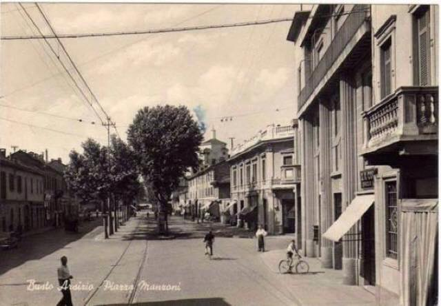 Piazza Manzoni - Tramvia